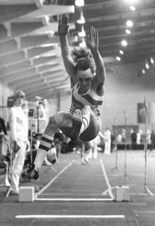 Heike Daute ADN-ZB Weisflog 2.2.83 Berlin: Leichtathletik-Sprungmeeting in der Dynamo-Sporthalle (am 1.2.83) . Die 18jährige Weitsprung-Junioren-Europameisterin von 1981, Heike Daute (SC Motor Jena - Foto von den DDR-Hallenmeisterschaften 1982 in Senftenberg) , erreichte mit 6,88 m eine neue Hallen-Weltbestleistung.